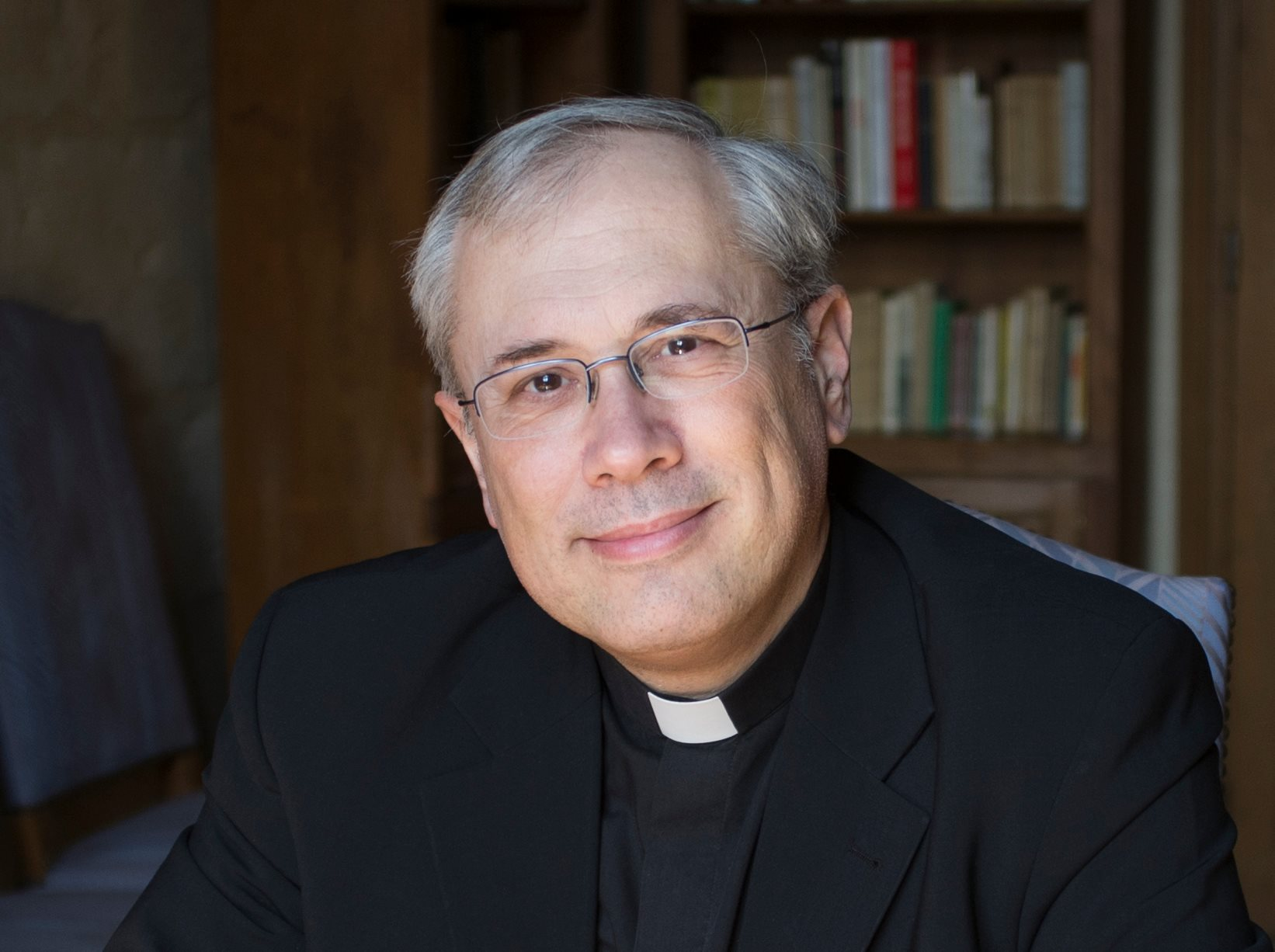 Le vicaire de l'Opus Dei en France, photographié au château de Couvrelles en France.